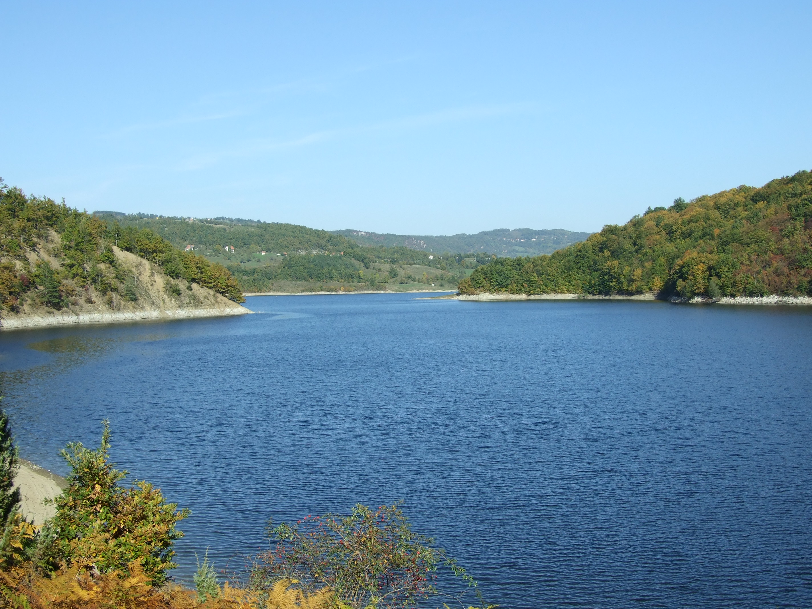 Azurno jezero